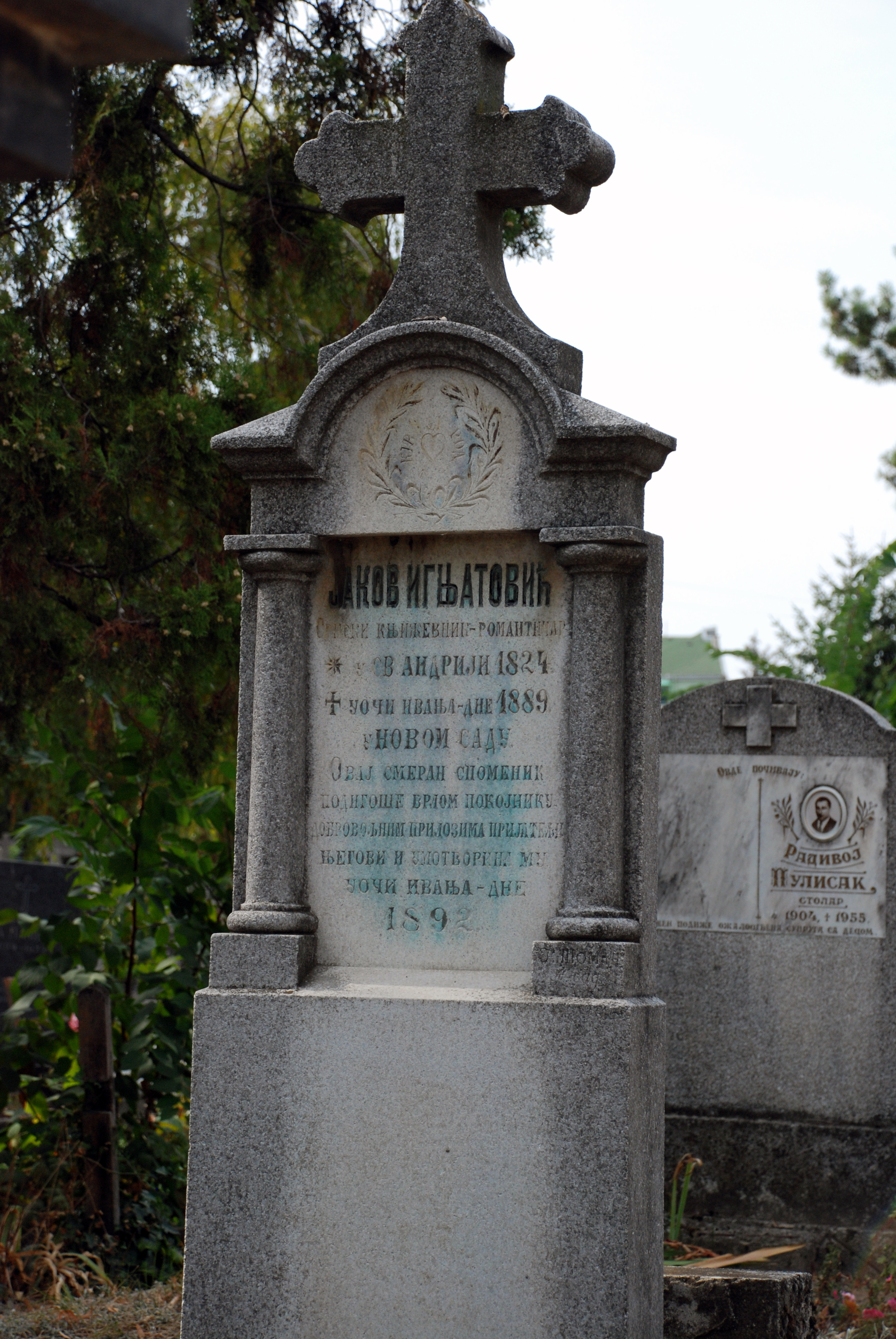 1824-1889, књижевник, приповедач, први реалиста у историји српске прозе, уређивао Летопис матице српске, Весник, Недељни лист, један од идеолога националног романтизма, мемоарист, једно време бавио се адвокатуром, написао више познатих романа